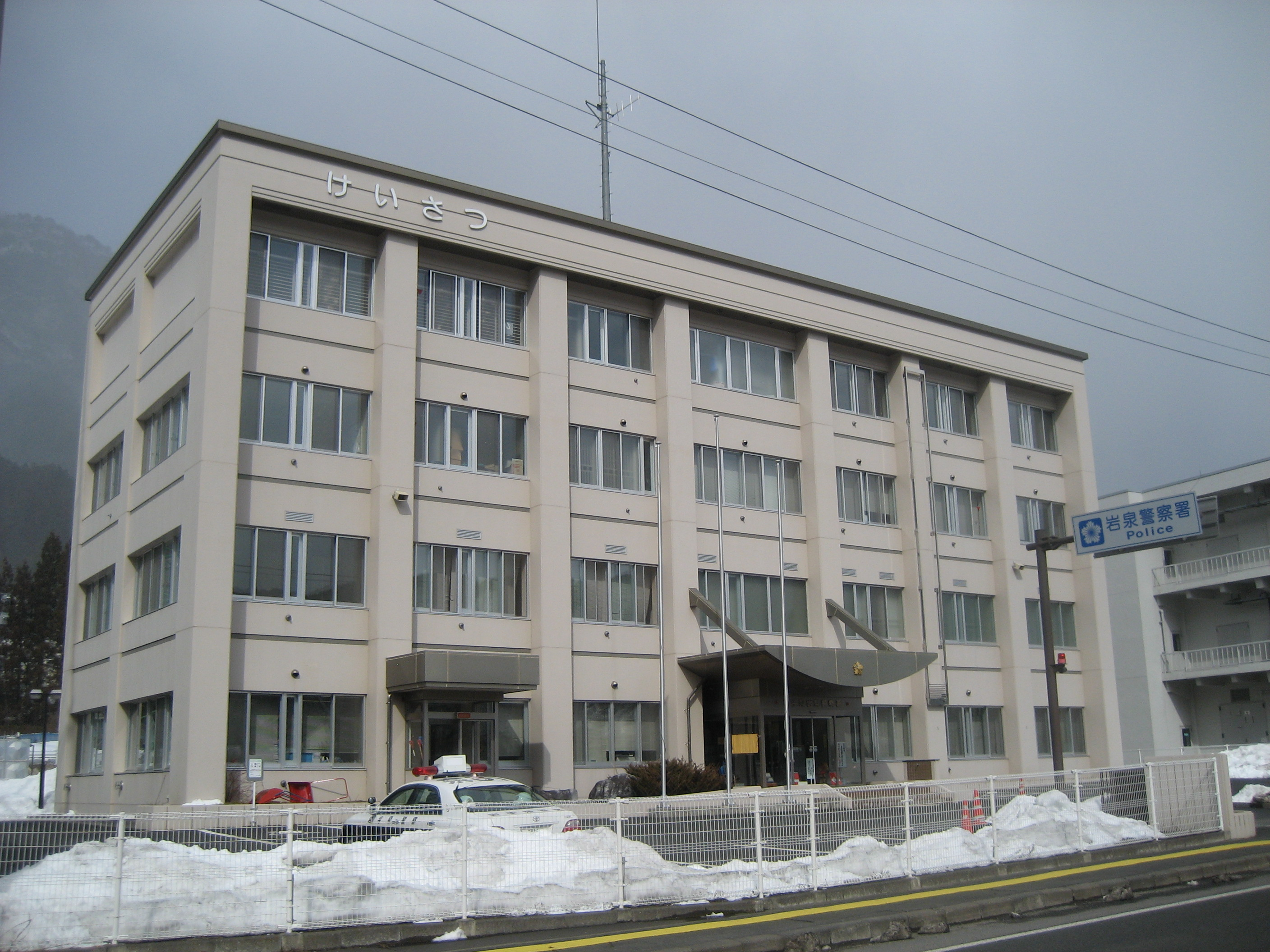 岩手県警察岩泉警察署庁舎